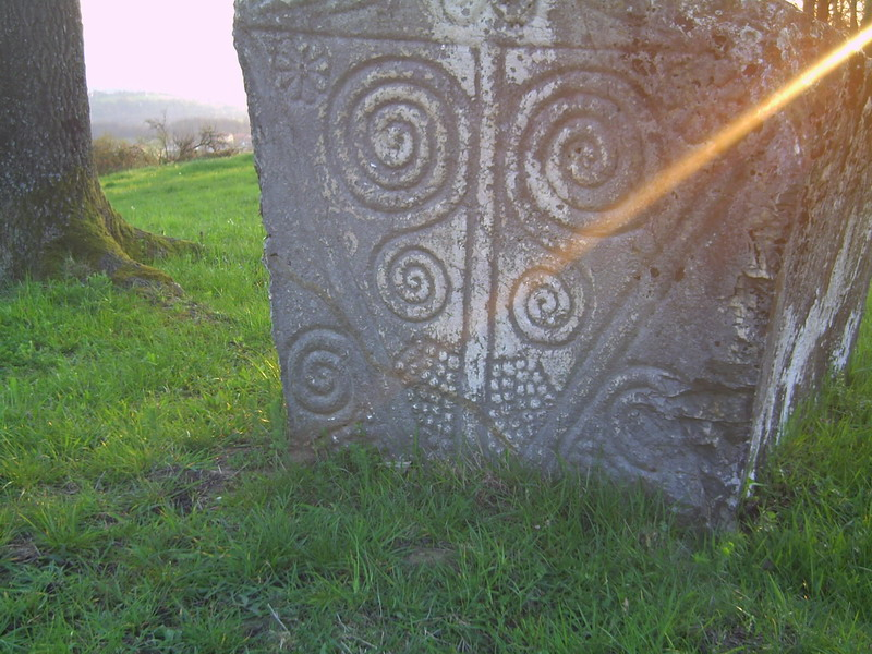 Stećak, Mramorje, Bulatovci